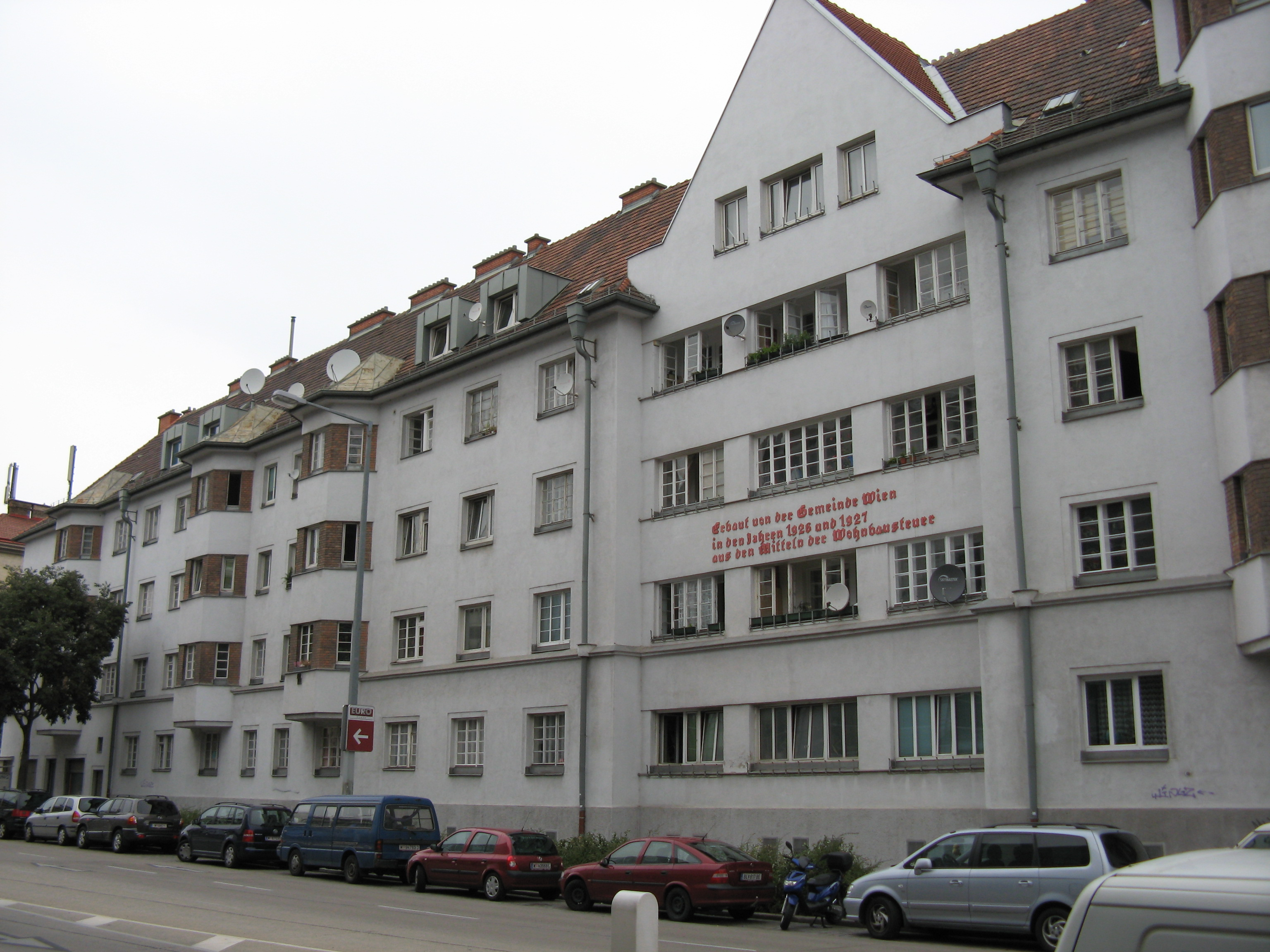 Wohnhausanlage Am Wienerberg, 1925-27, in Wien-Meidling